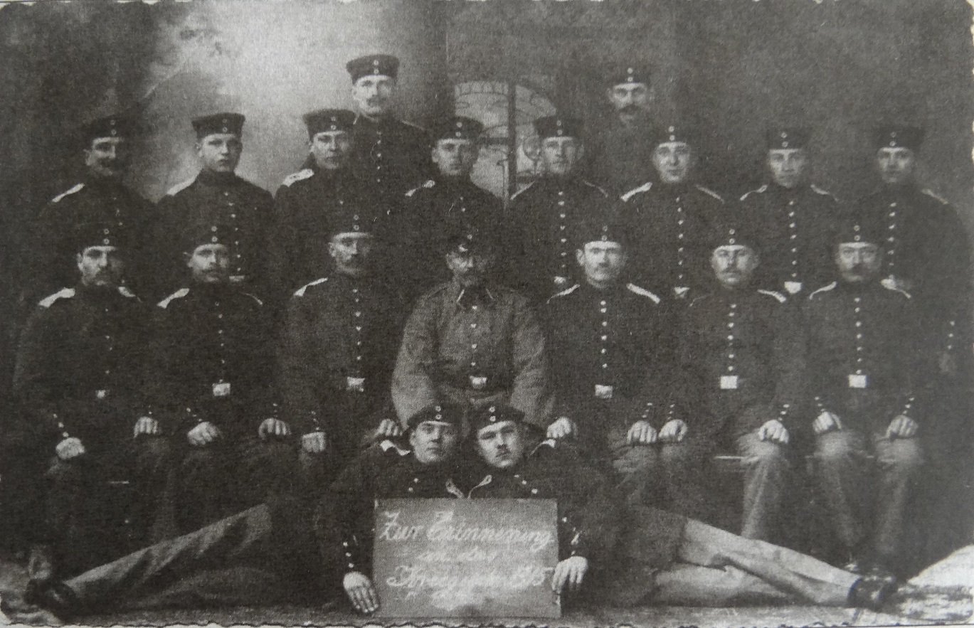 Stargard i. P., 1915 r. Żołnierze 9 Pułku Grenadierów